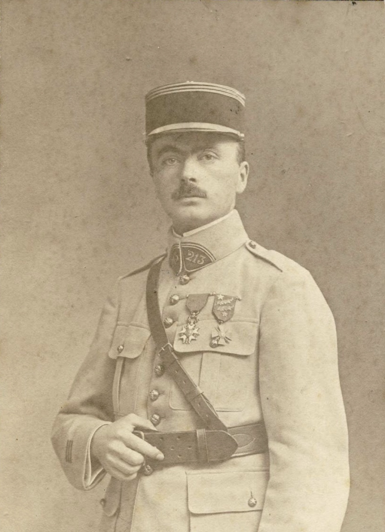 Photo de famille